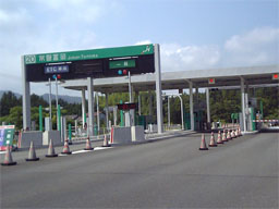 常磐自動車道常磐富岡インターチェンジ